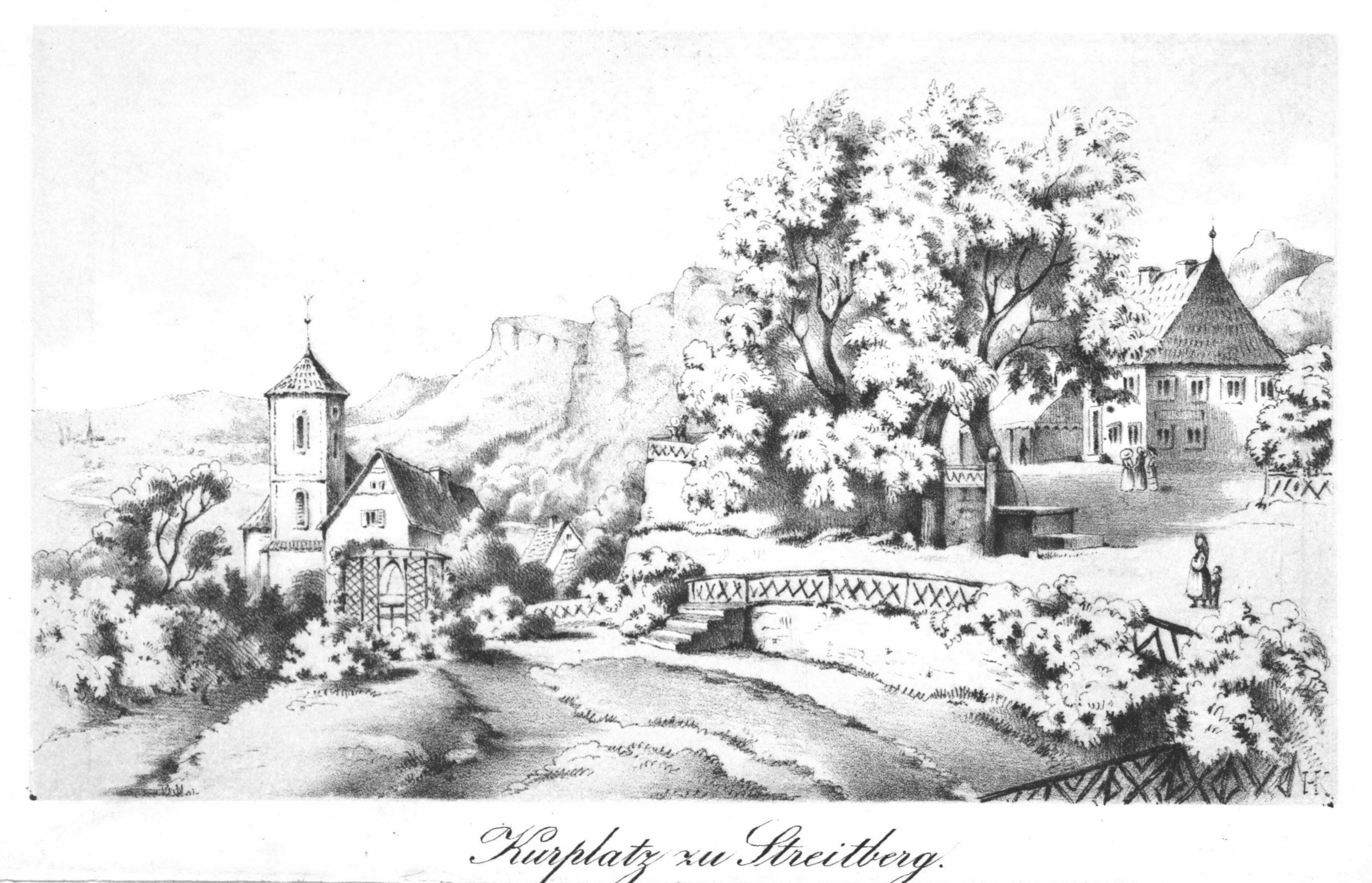 Streitberg in Die Fränkische Schweiz und die Molkenkur-Anstalt zu Streitberg. 1856.